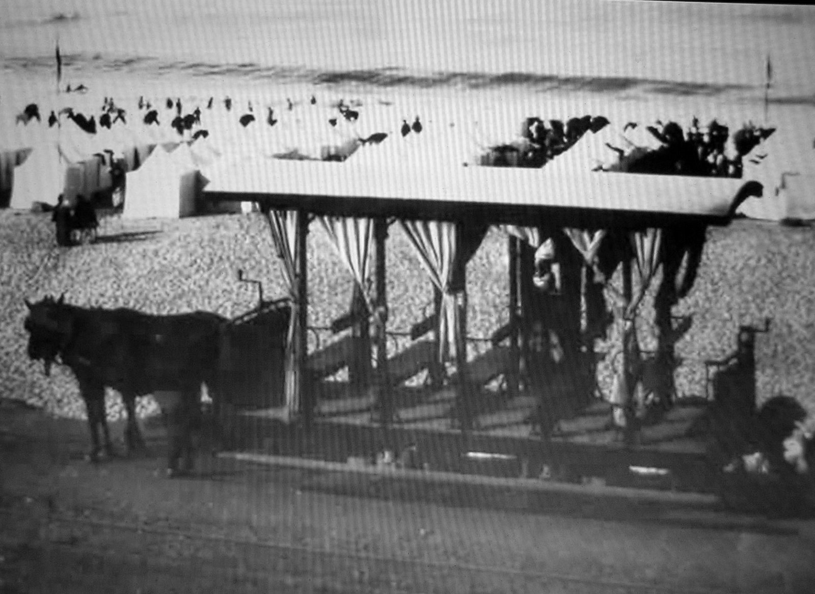 Carro americano passando em frente da praia.